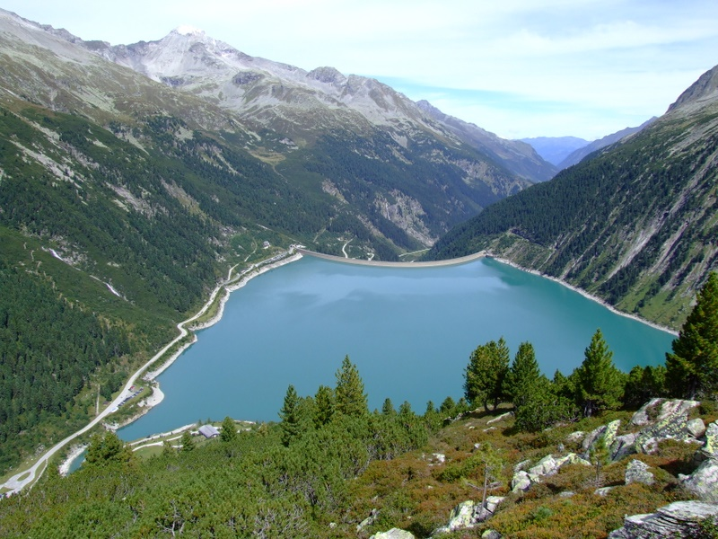 Jezioro zaporowe Schlegeis w Alpach Zillertalskichwybudowane w 1971 r. Wysokość muru - 135, długość korony 750 m, szerokość muru 9 m, szerokość muru u podstawy 35 m.